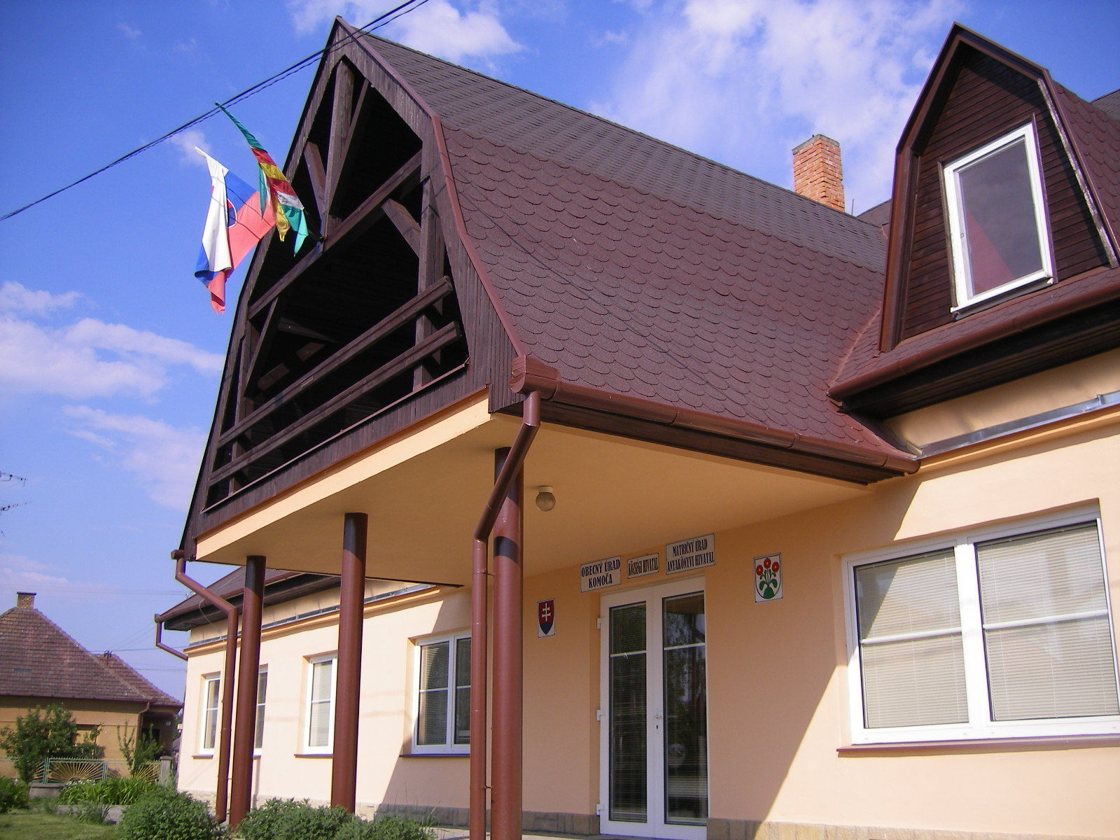 Kamocsa - községháza